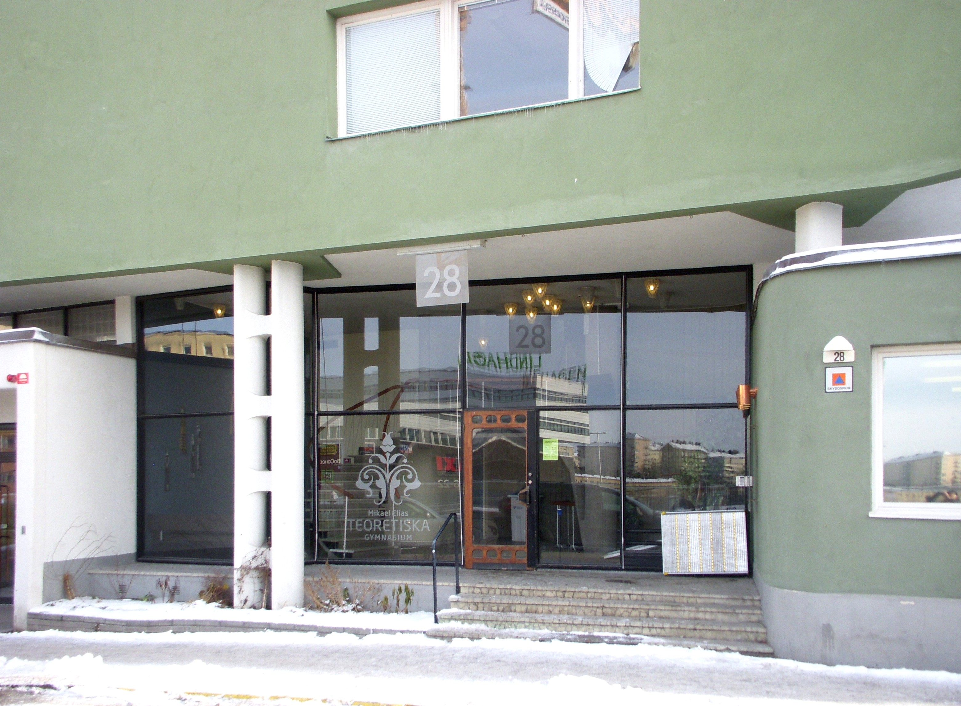 Byggnad för "Enequist, Holme & Co, Warfvinges väg, Stadshagen, Stockholm, arkitekt Ralph Erskine